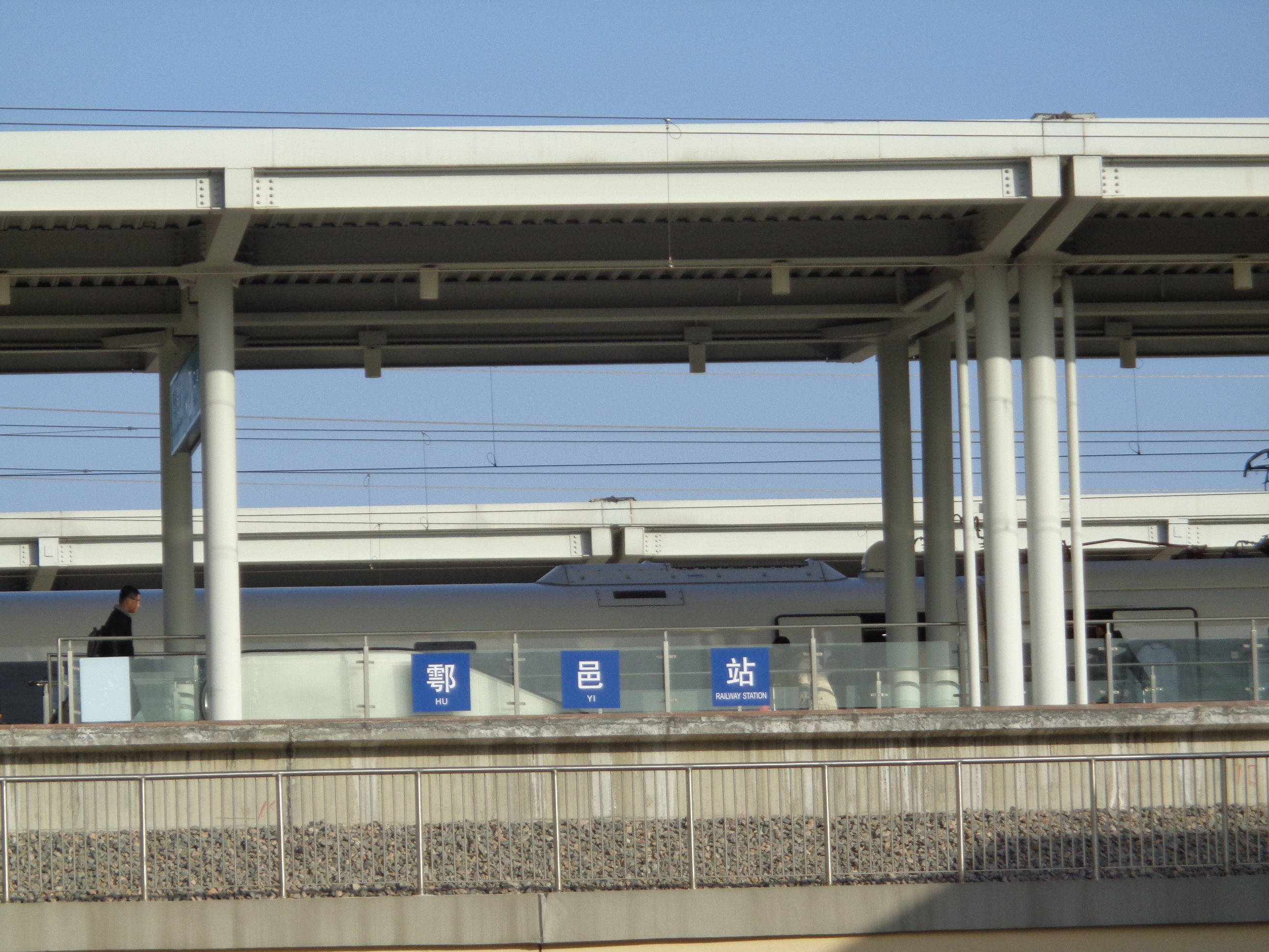 西安市鄠邑区秦渡镇鄠邑站